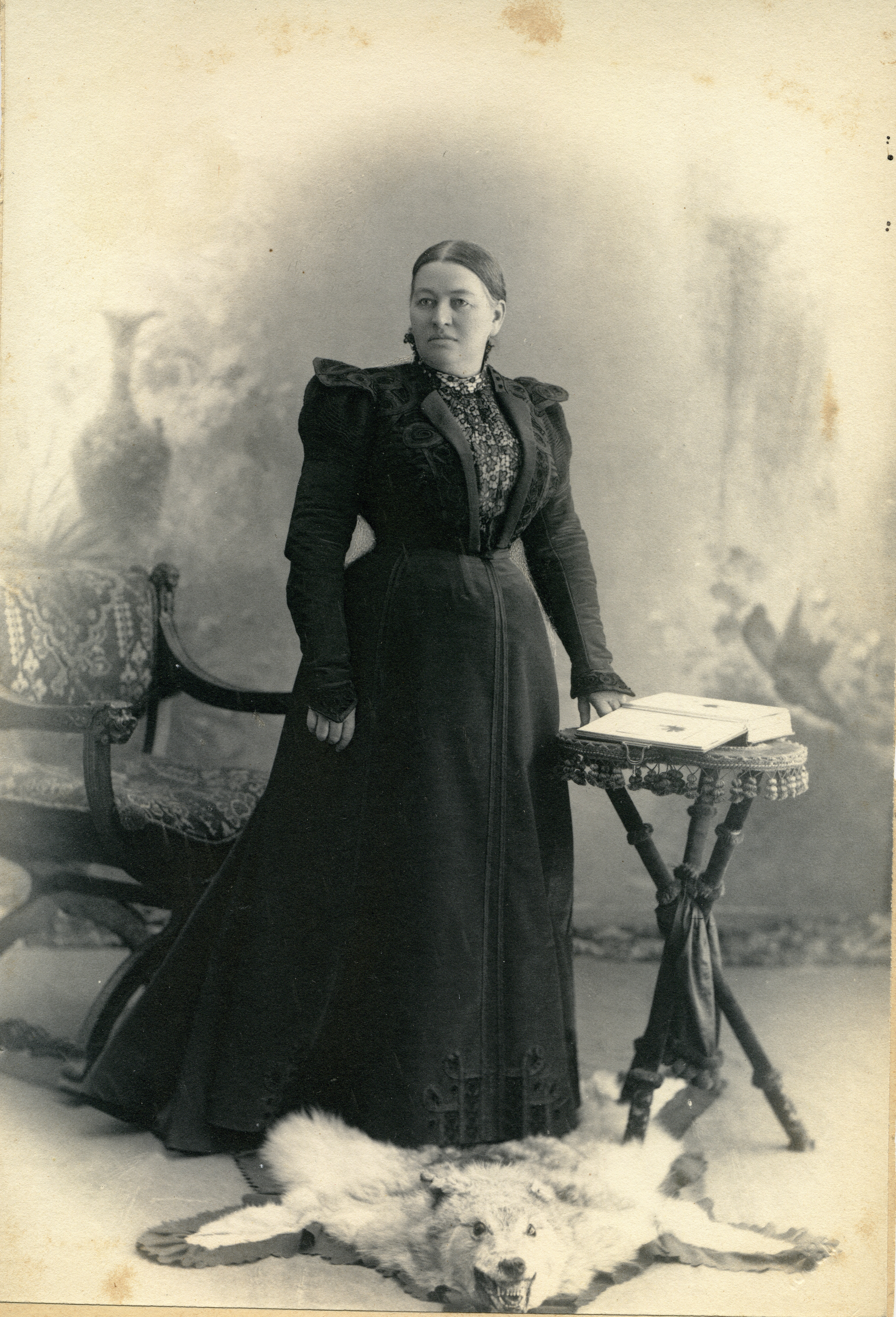 фото А.В.Мараевой из архива Серпуховского историко-художественного музея